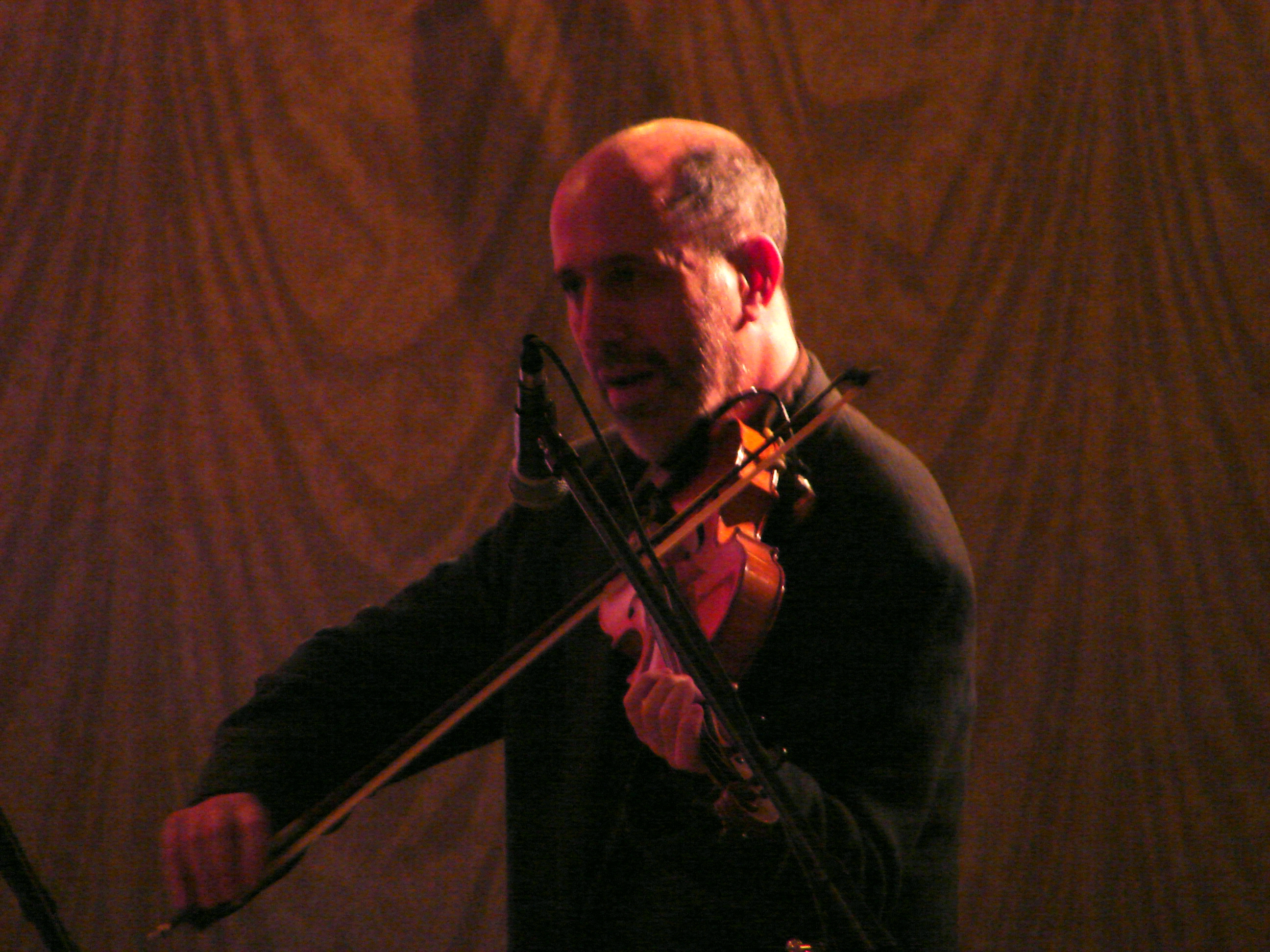 Matt Glaser